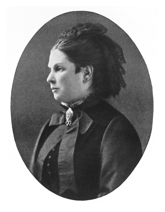 Anna Filosofova